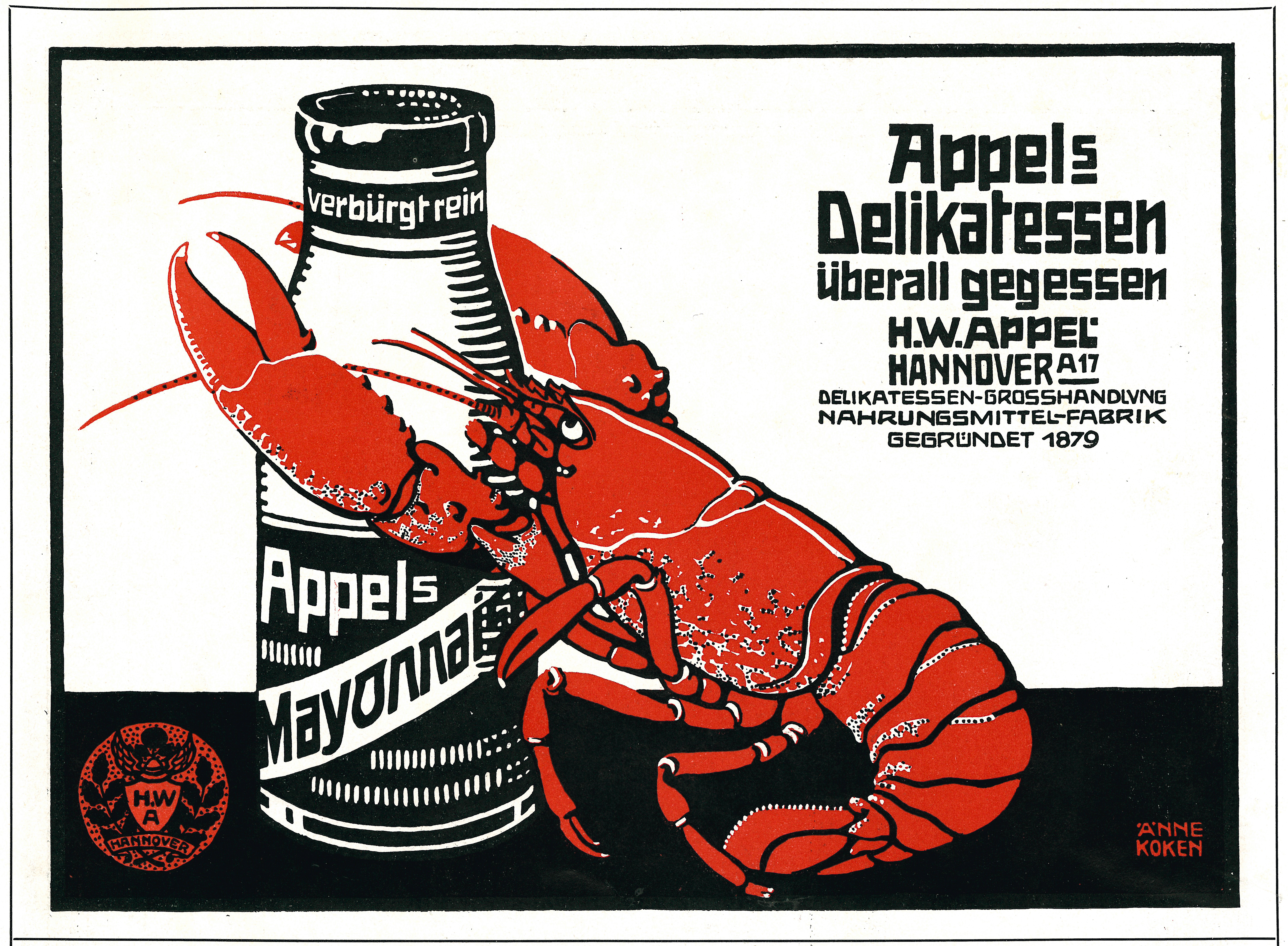 Der berühmte Hummer, 1909 von Änne Koken als Markenzeichen für die (damalige) "Delikatessen-Grosshandlung und Nahrungsmittel-Fabrik" Heinrich Wilhelm Appel (H.W.A.) und ihre Mayonnaise entworfen, hier als halbseitig und zweifarbig abgebildet in der Sonderausgabe der IIllustrirten Zeitung Nr. 3538, "136. Band" mit dem Titel Kulturbilder aus Deutschland IV: Hannover und Grenzgebiete, die in einer Kooperation mit dem Hannoverschen Anzeiger und dem Fremdenverkehrsverein Hannovers entstand. Der abgebildete Hummer an der Flasche, auch als Reklamemarke verwendet, brachte das Produkt nicht nur einem zahlungskräftigen Kundenkreis näher, sondern machte auch die Designerin schlagartig überregional bekannt ...